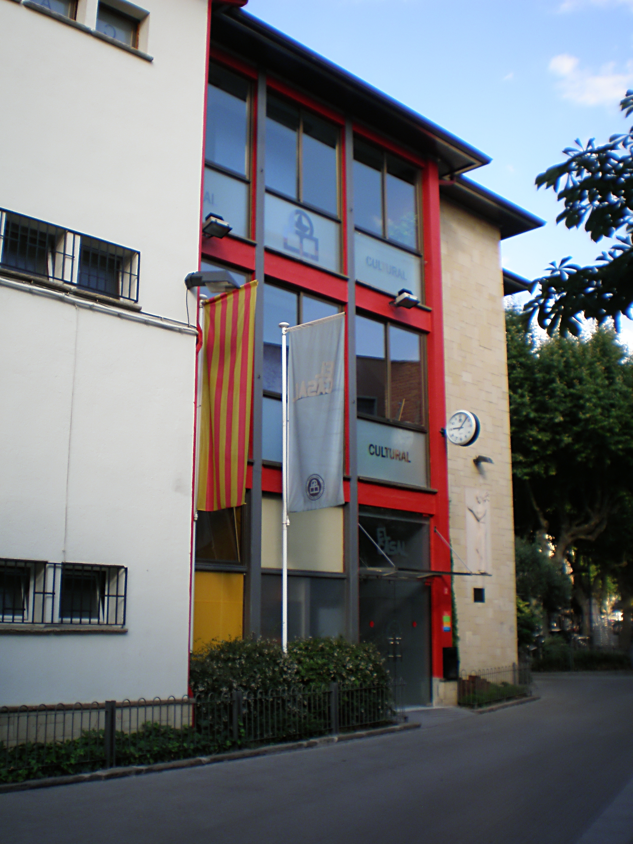 Mollet del Vallès: Casal Cultural a la Rambla de Balmes.